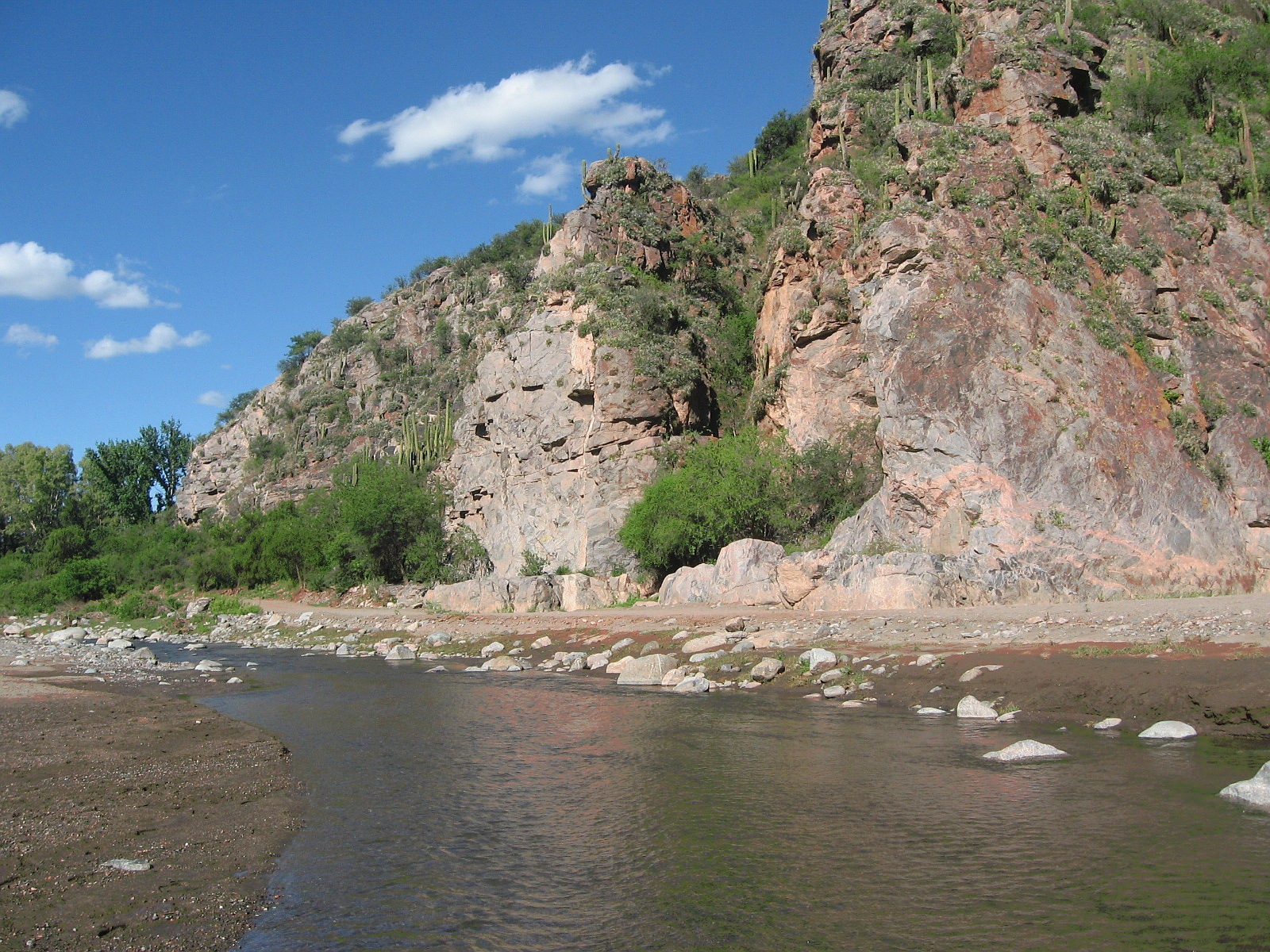 Río del Valle, en dirección al paraje La Majadita, dentro de la Reserva Provincial Valle Fértil. Provincia de San Juan. Argentina